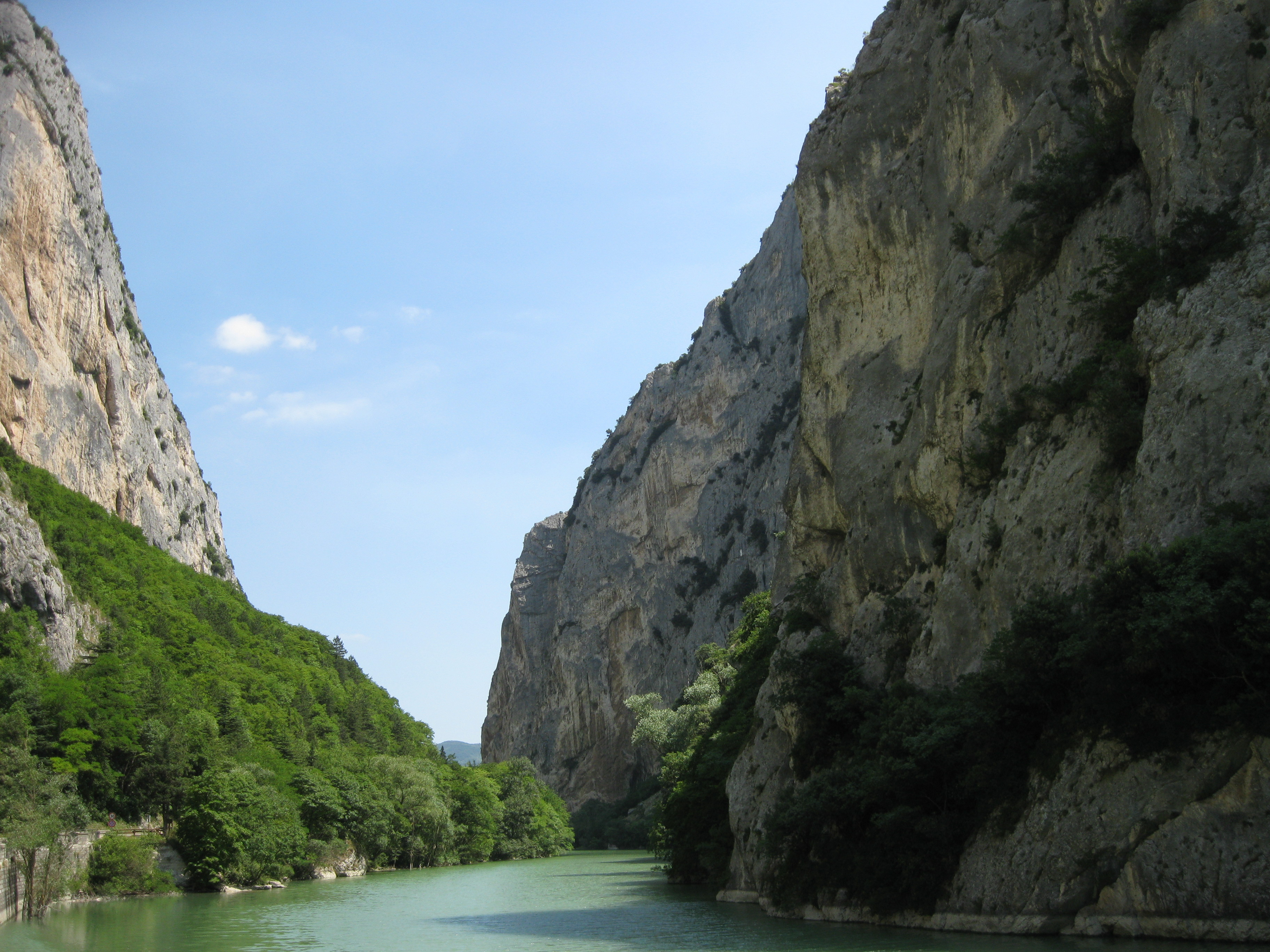 Gola del Furlo, Marche, Italien